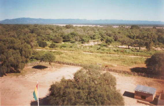 Floresta, Santa Cruz, Bolivia - Vista hacia el Río Parapetí.